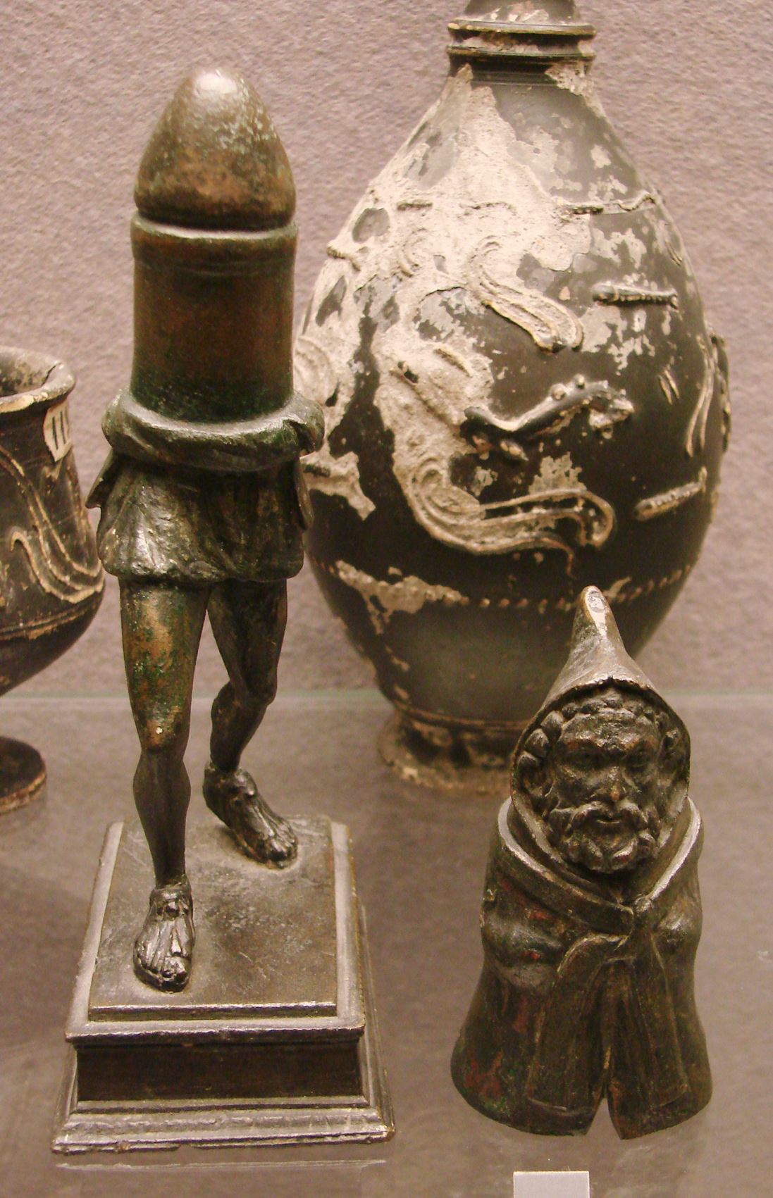 Priape dit "de Rivery" d'après son lieu de découverte: statuette de Priape constituée de deux parties, trouvée à Rivery (Somme) en 1771. 2ème moitié du 1er siècle après JC.Musée de Picardie à Amiens.